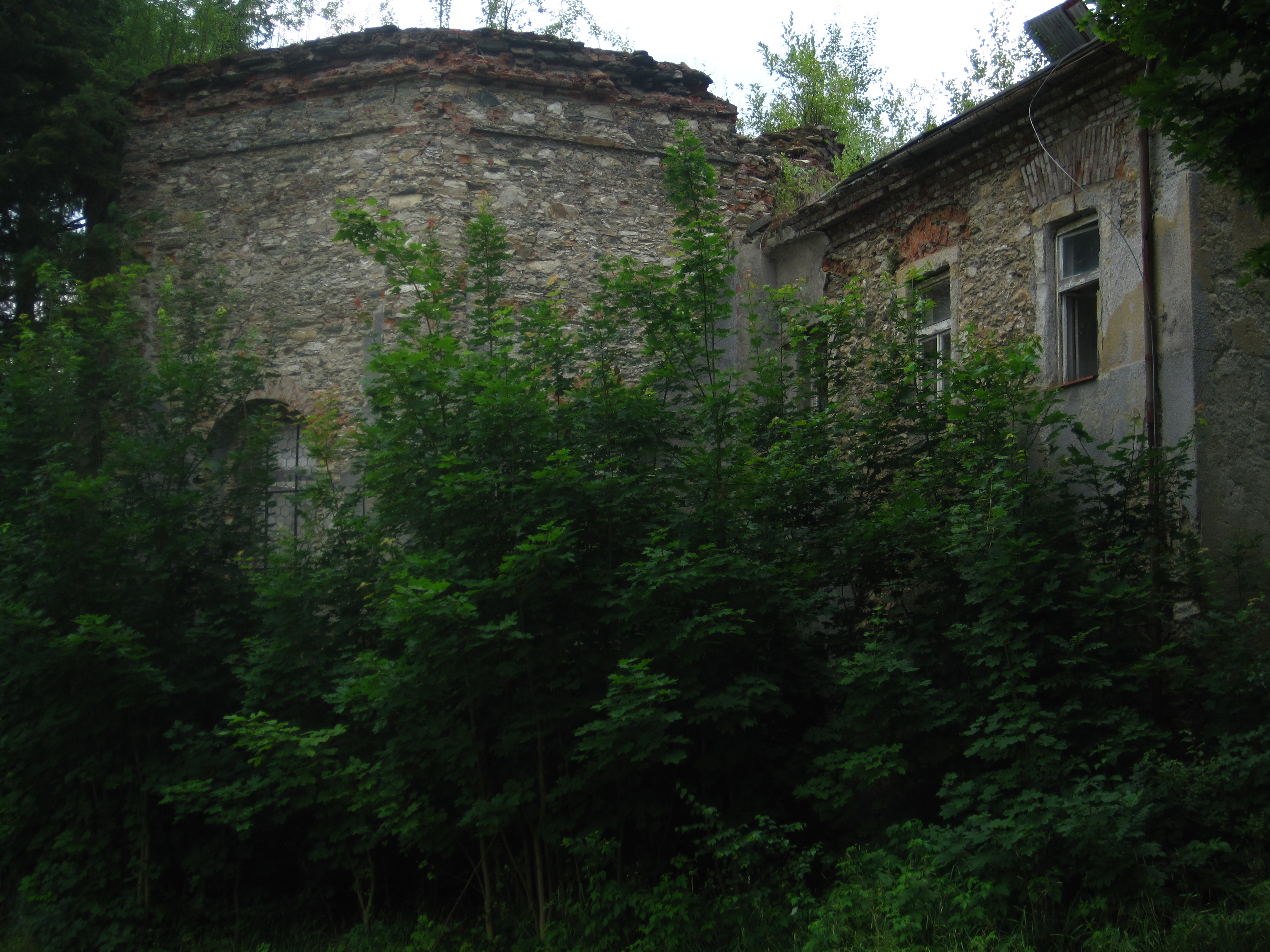 Jesenný - zámek